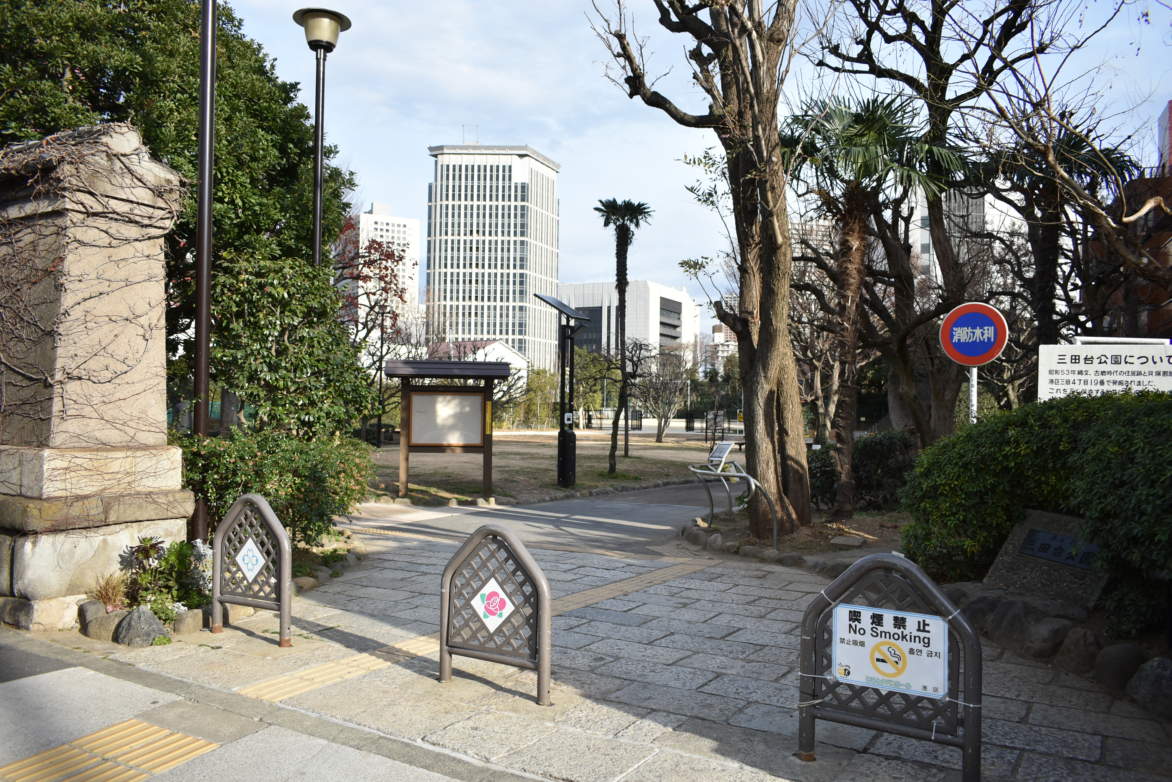 三田台公園 Nikon D3400